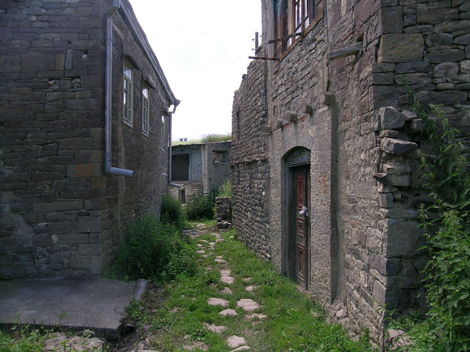 Лакский район, с. Хури